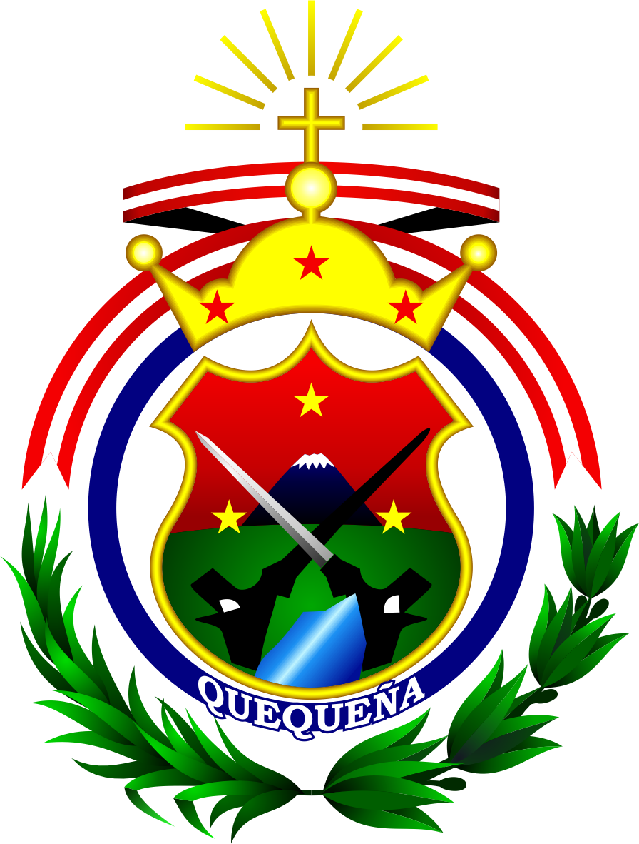 Distrito de Quequeña